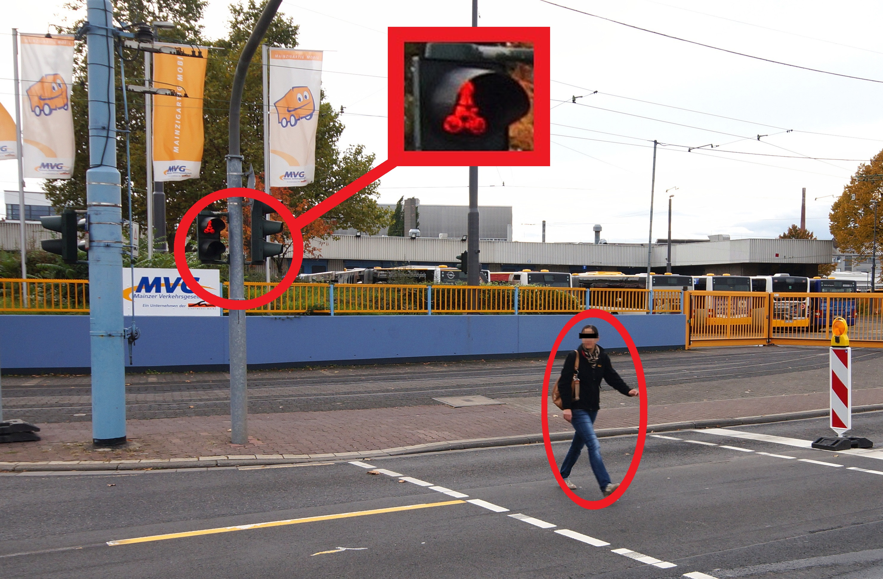 Eine Fußgängerin missachtet eine rote Ampel über die Rheinallee in Mainz. Das ist eine Ordnungswidrigkeit nach dem §37 in Verbindung mit dem §49 der Straßenverkehrs-Ordnung in Deutschland. Sie wird mit einem Regelsatz von 5 € geahndet.